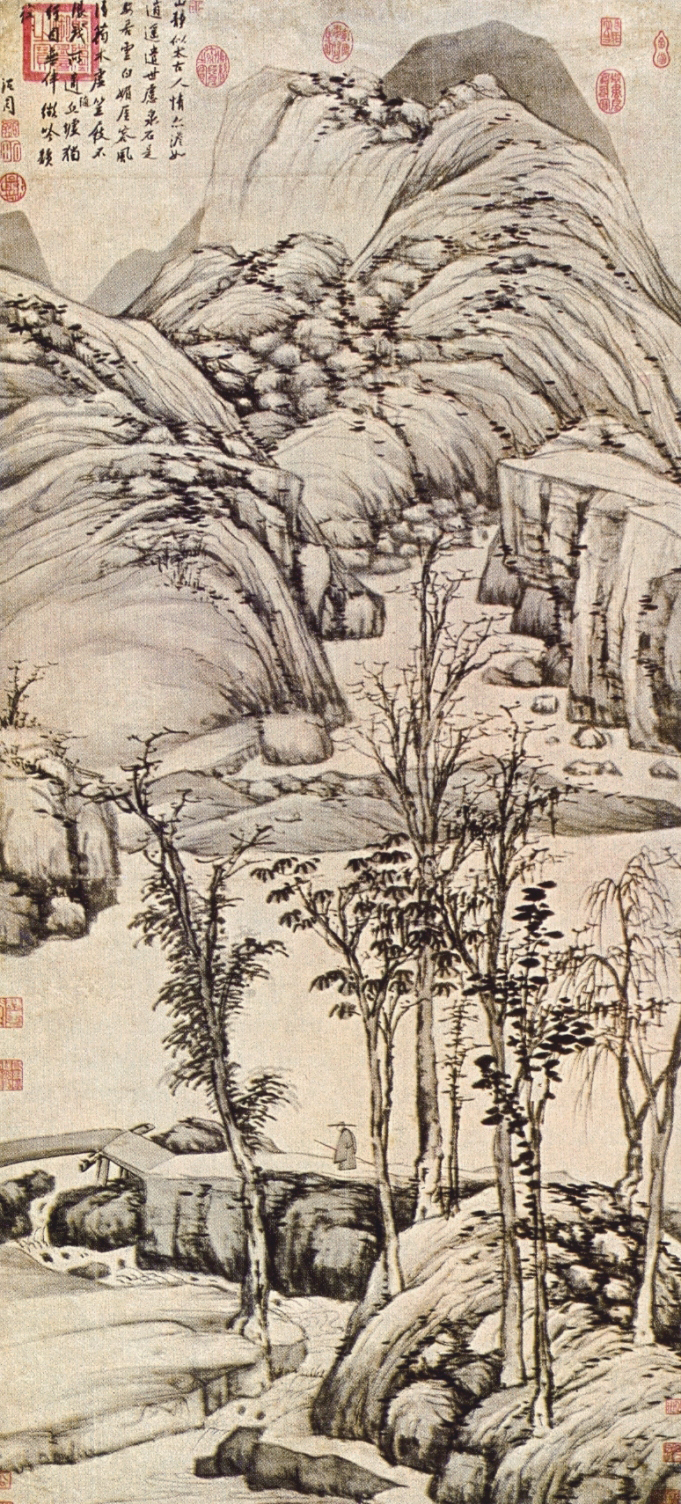 Peinture à la manière de Ni Zan (1301-1374)